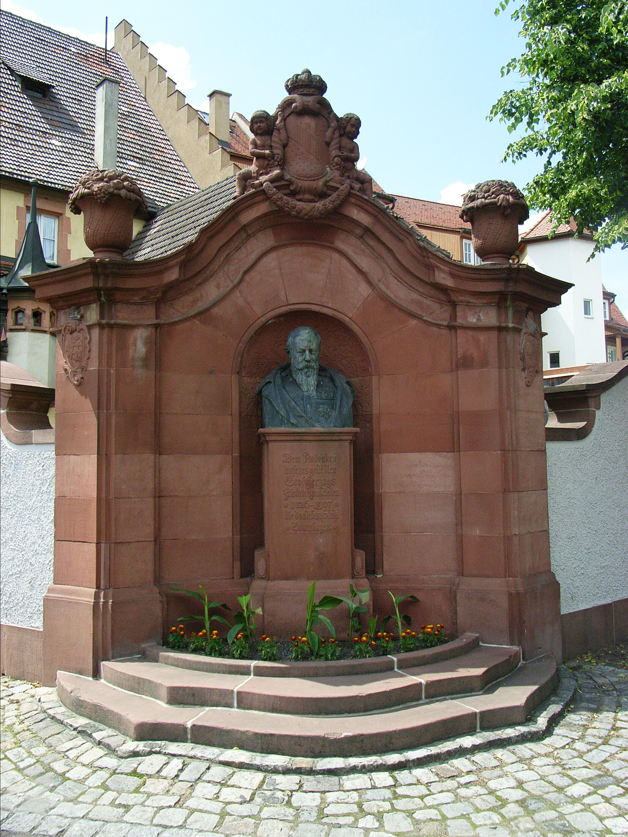 Dieses Bild zeigt ein Andenken der Stadt Bräunlingen an den Grossherzog Friedrich I., geschaffen von Wilhelm Sauer